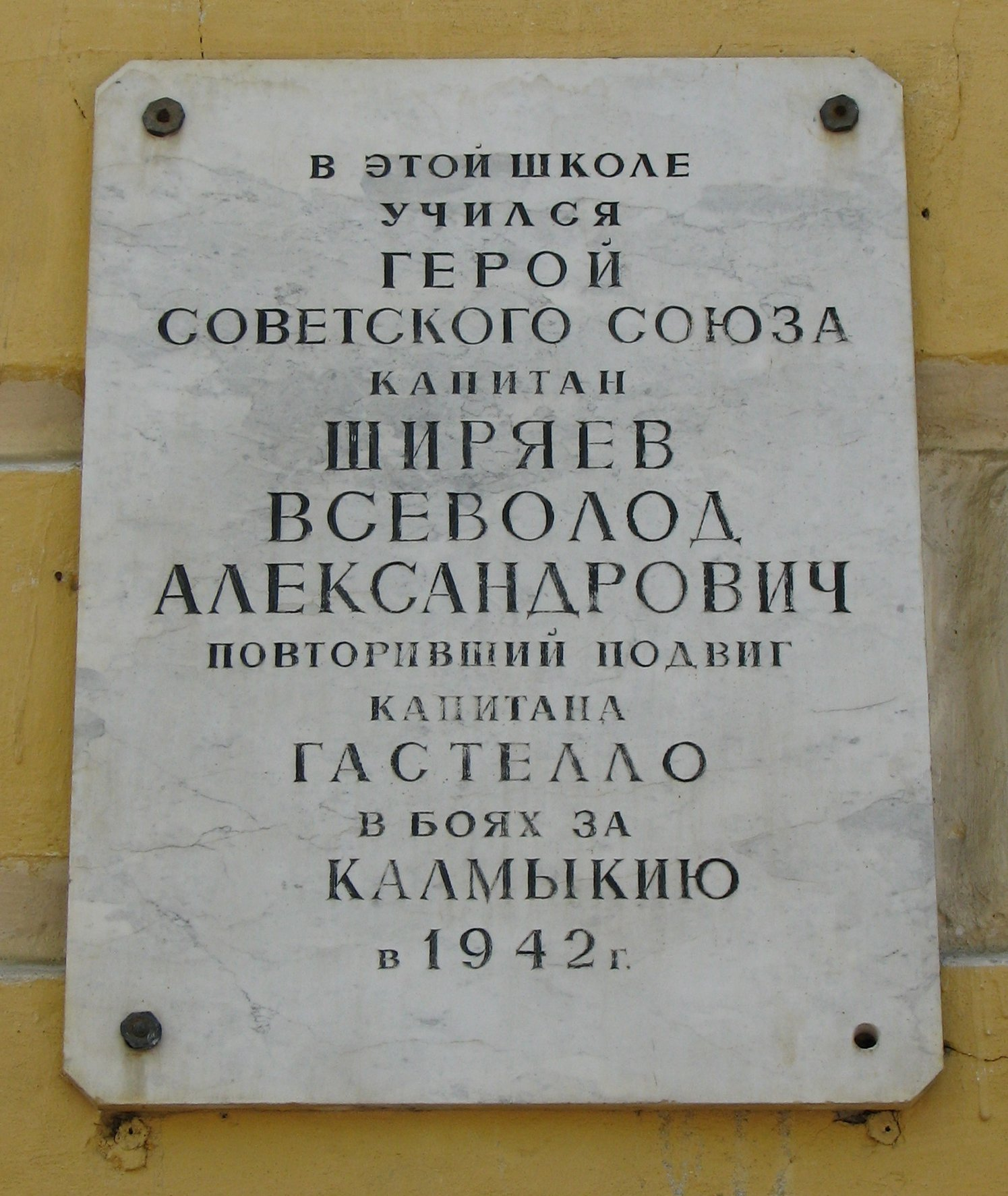 Мемориальная доска, посвящённая Всеволоду Александровичу Ширяеву. Школа № 4, Гатчина